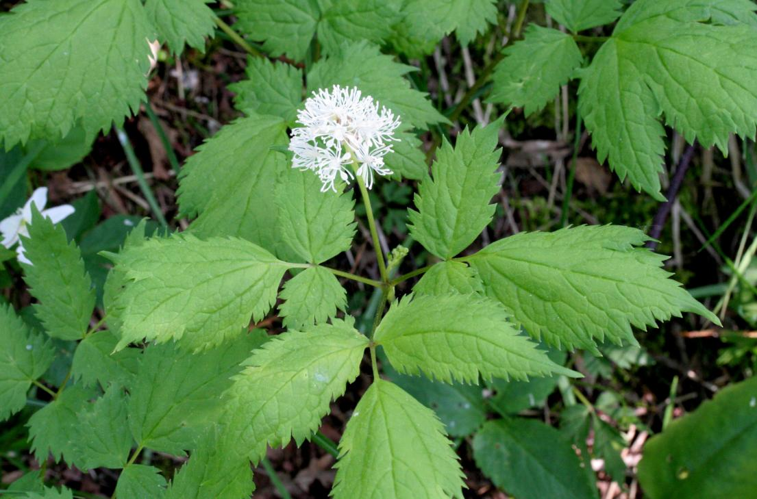 Barba di capra - Val Piana, Limana (BL), 850 m s.l.m.